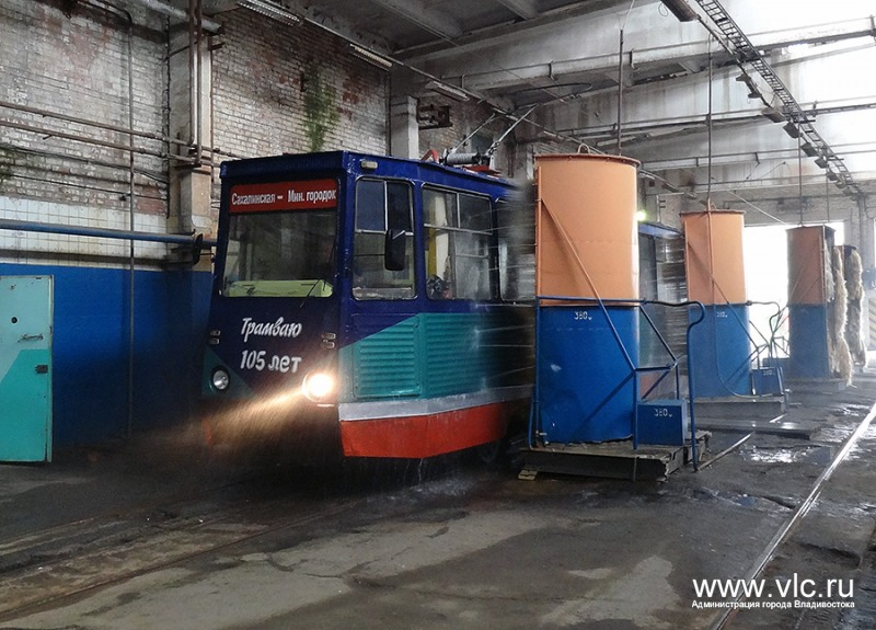 Трамвай КТМ-5 № 297 на автоматической мойке в депо, Владивосток